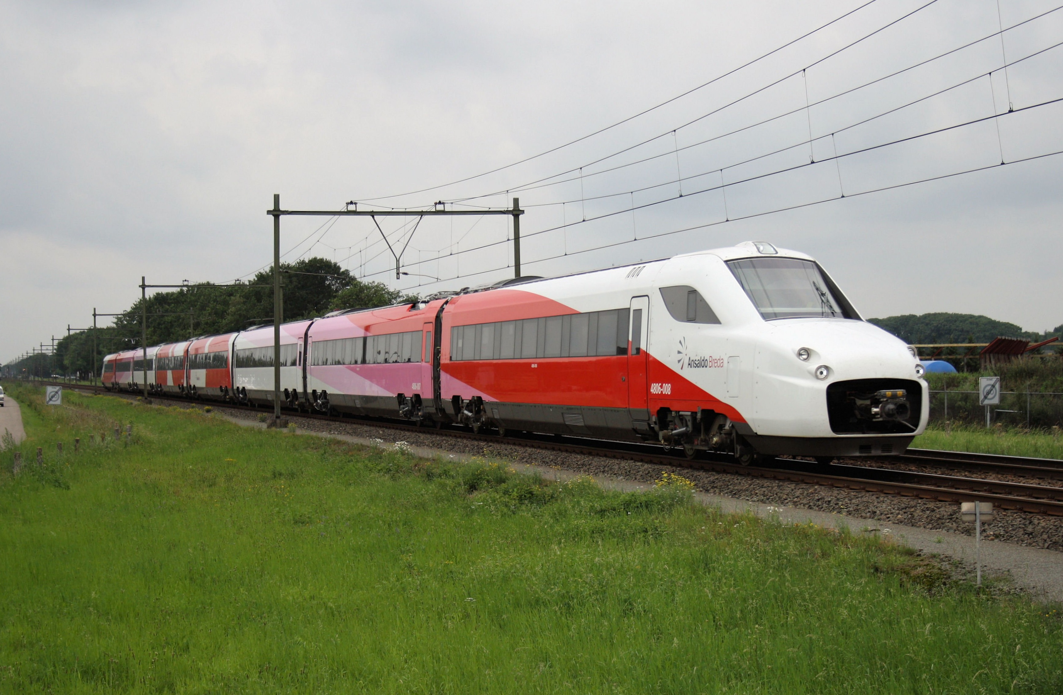 Fyra heeft zojuist het station van Deurne gepasseerd en gaat verder naar Horst. Even voorbij Deurne worden er div. metingen gedaan. De testritten zijn morgen, vrijdag, ook nog op baanbak Helmond-Horst.